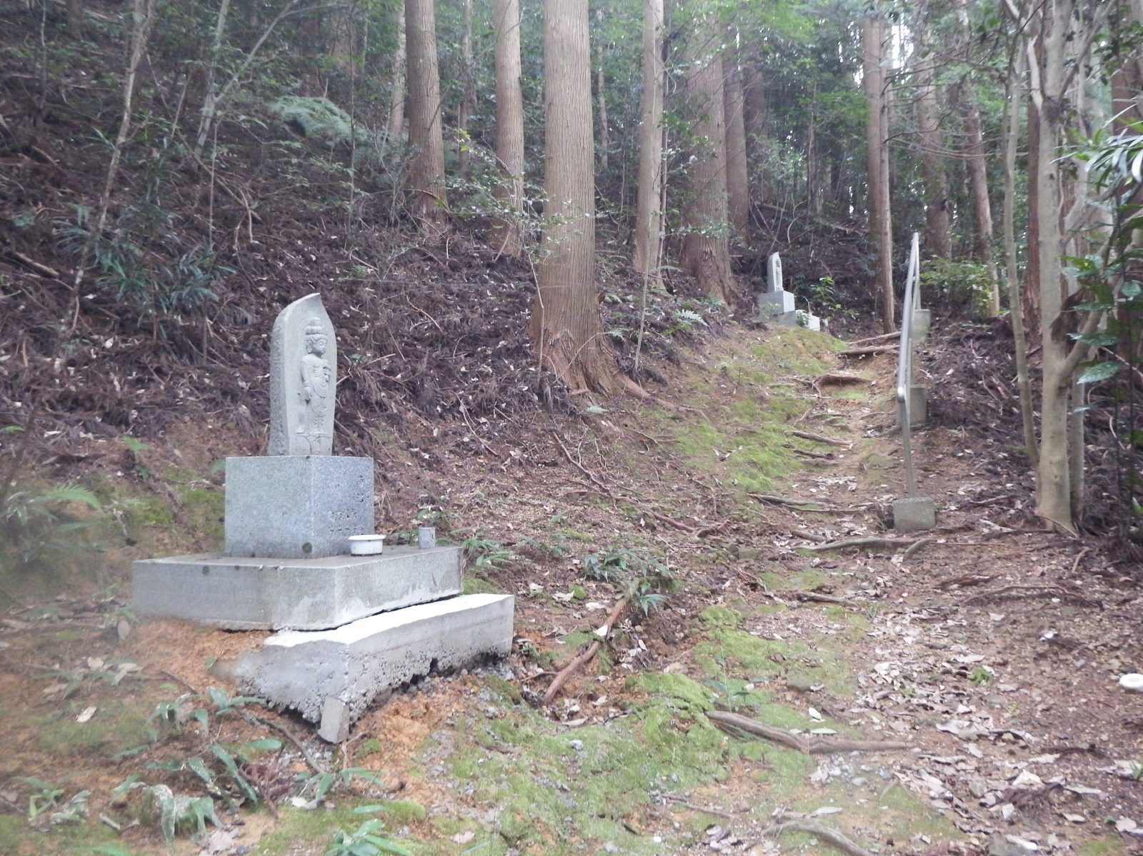 仏木寺三十三観音霊場